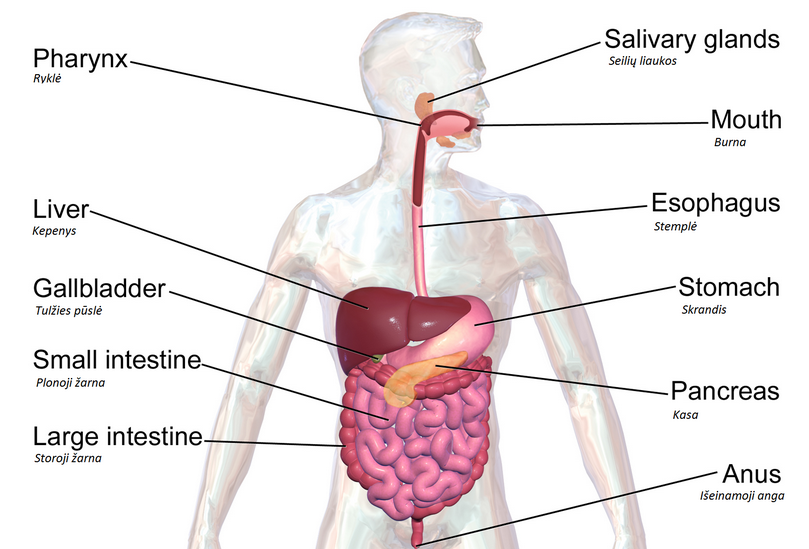 Das menschliche Verdauungssystem.